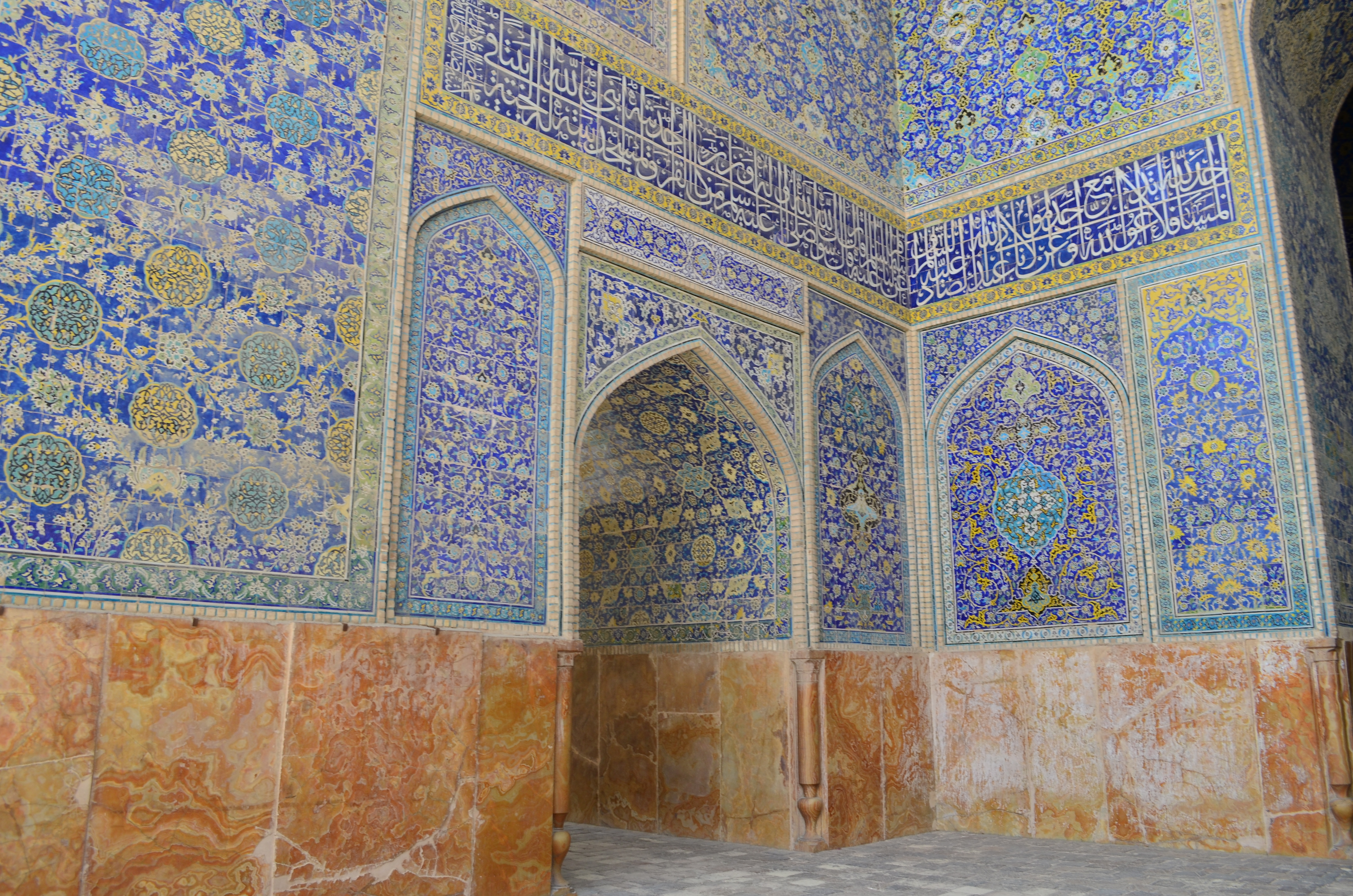 مسجد شاه، میدان نقش جهان، اصفهان، ایران